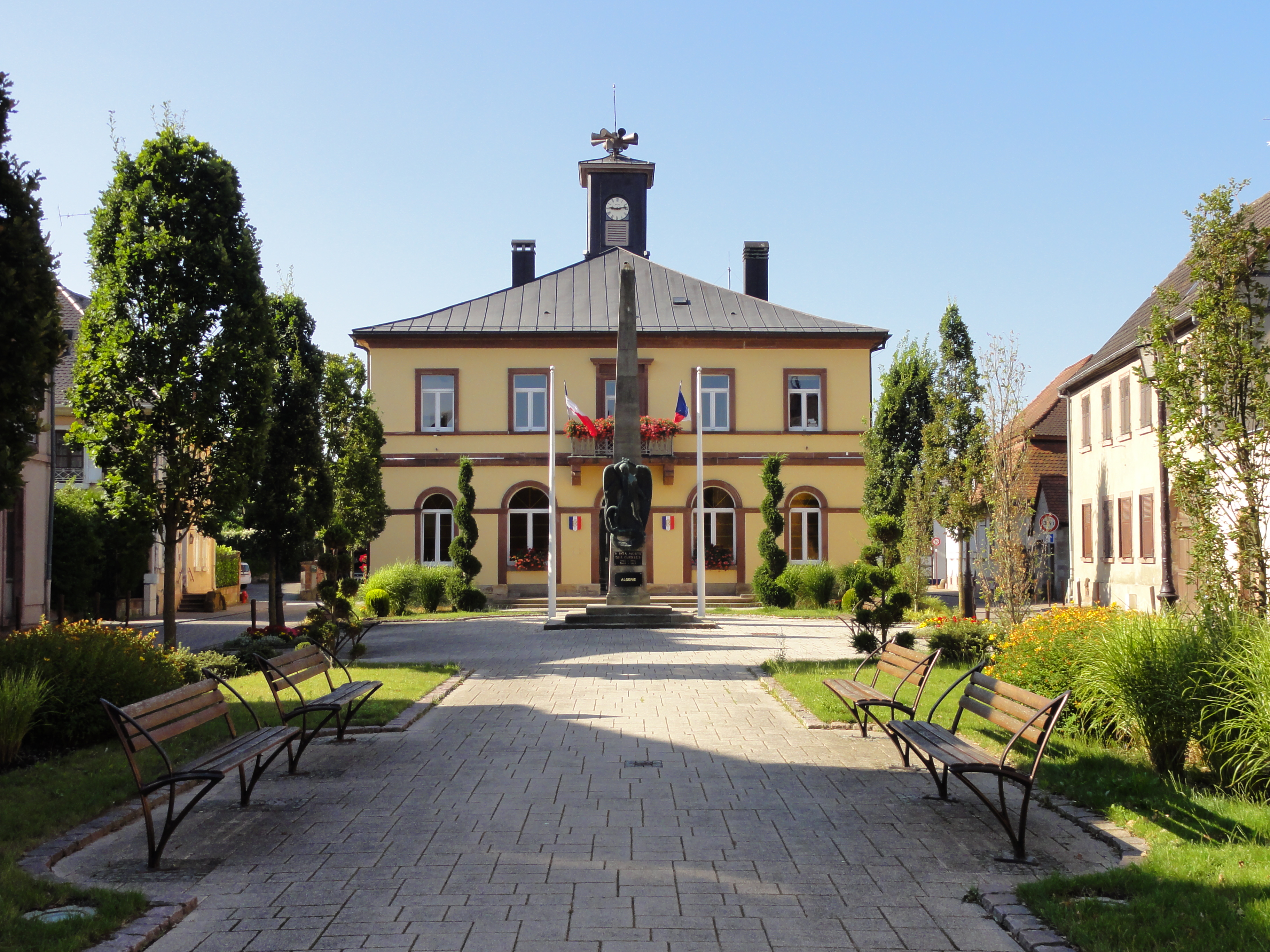 Alsace, Bas-Rhin, Seltz, Mairie (1832), 10 place de la Mairie. .